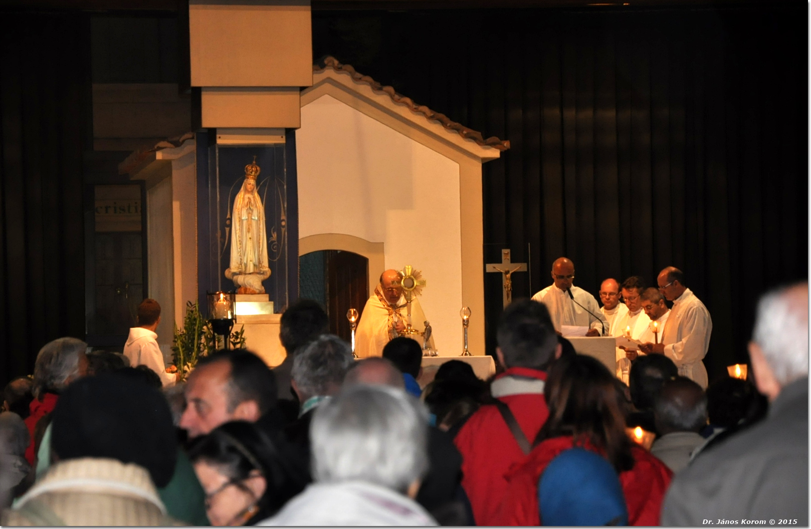 Internationales Rosenkranzgebet und Lichterprozession